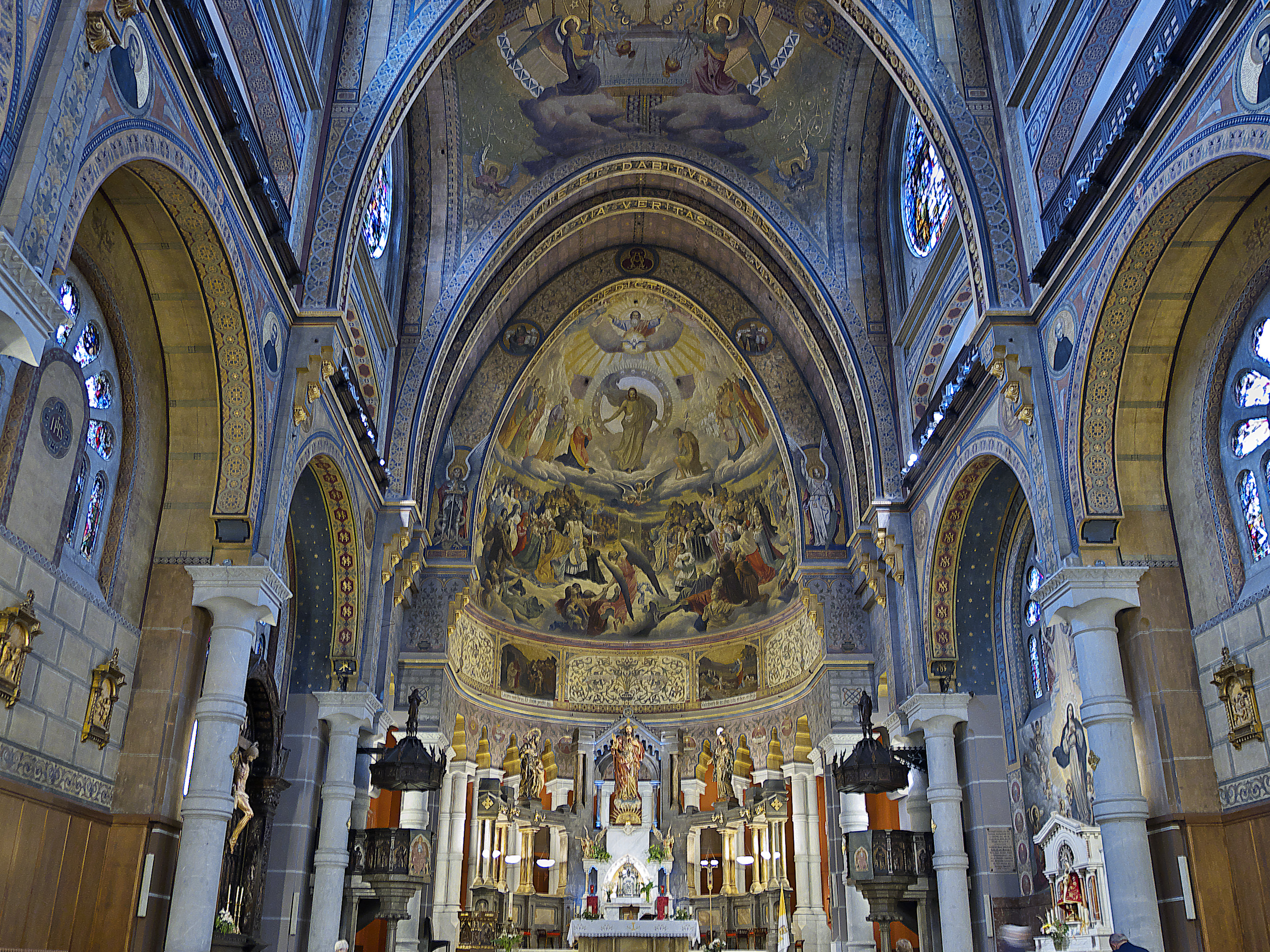 Iglesia para la Compañía de Jesús (1911) ejecutada por Miguel García de la Cruz (1874-1935) con proyecto de Rubio Bellver. La labor pictórica es de los hermanos Enrique y Guillermo Immenkamp (1922-1923)